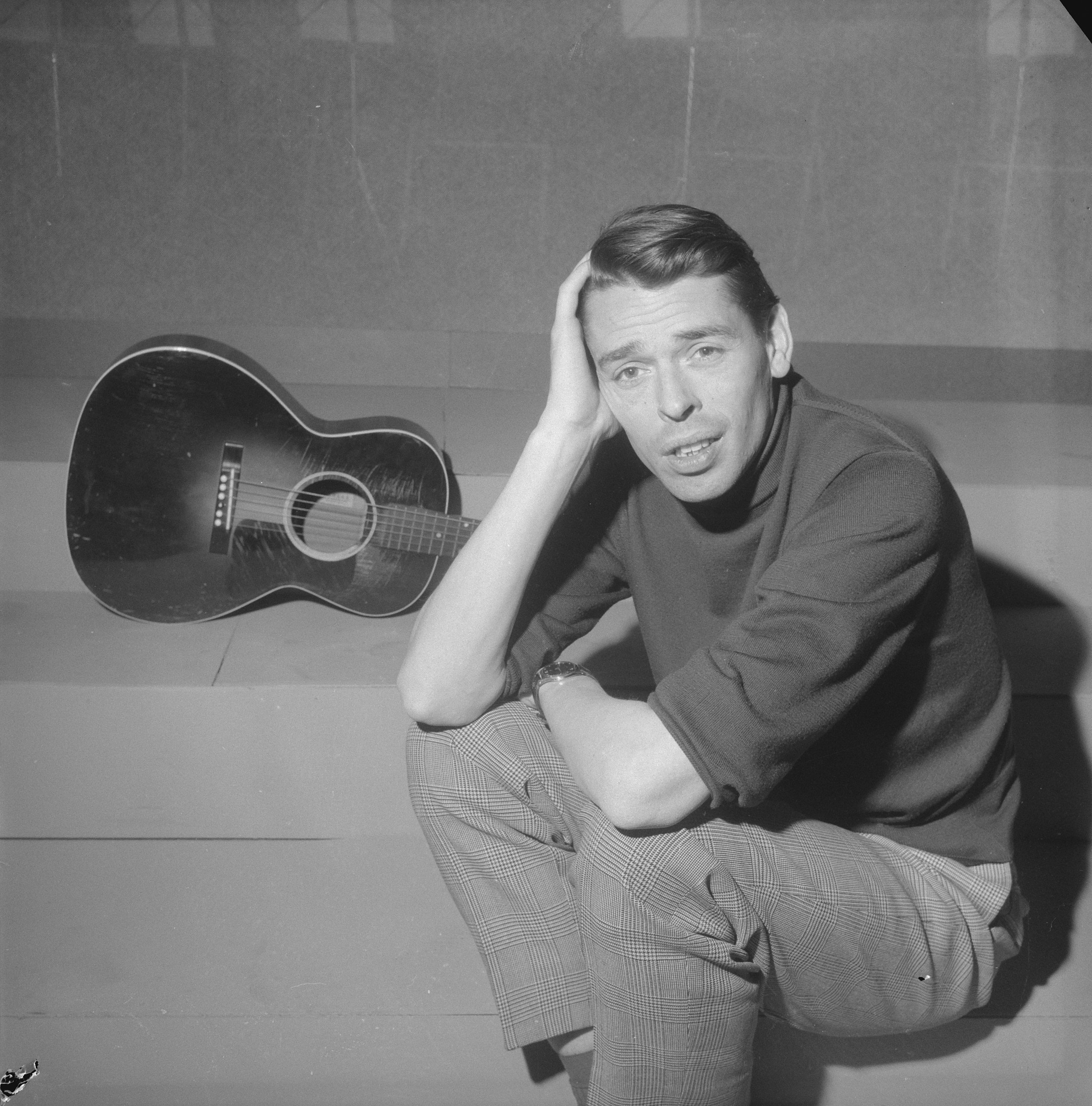 Collectie / Archief : Fotocollectie Anefo Reportage / Serie : [ onbekend ] Beschrijving : Jacques Brel in TV-programma Domino Datum : 21 maart 1962 Trefwoorden : TV-programma's, gitaren, zangers Persoonsnaam : Brel, Jacques Fotograaf : Nijs, Jac. de / Anefo Auteursrechthebbende : Nationaal Archief Materiaalsoort : Negatief (zwart/wit) Nummer archiefinventaris : bekijk toegang 2.24.01.03 Bestanddeelnummer : 913-6743